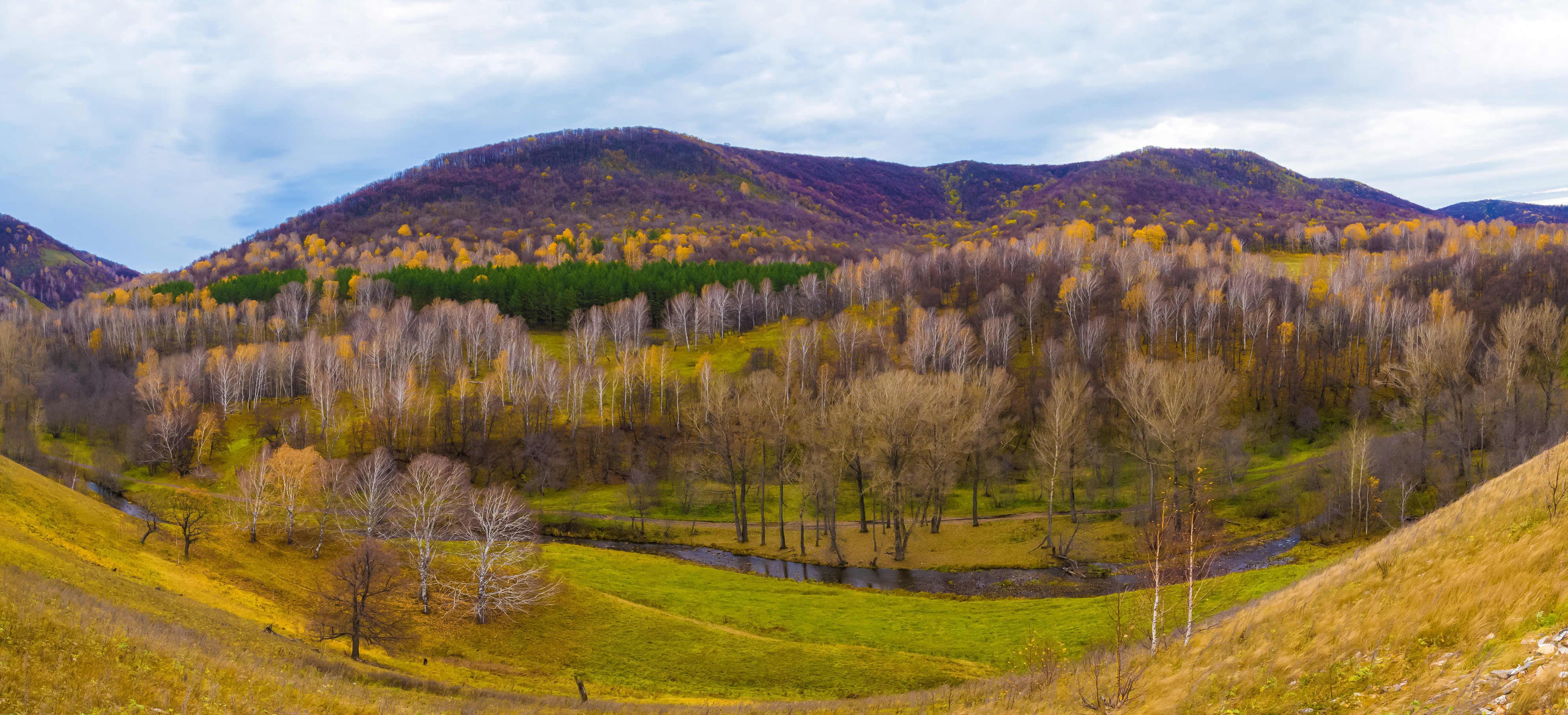 Горы по дороге из Уразбаево в Асиялан. Видны: р.Селеук, горы